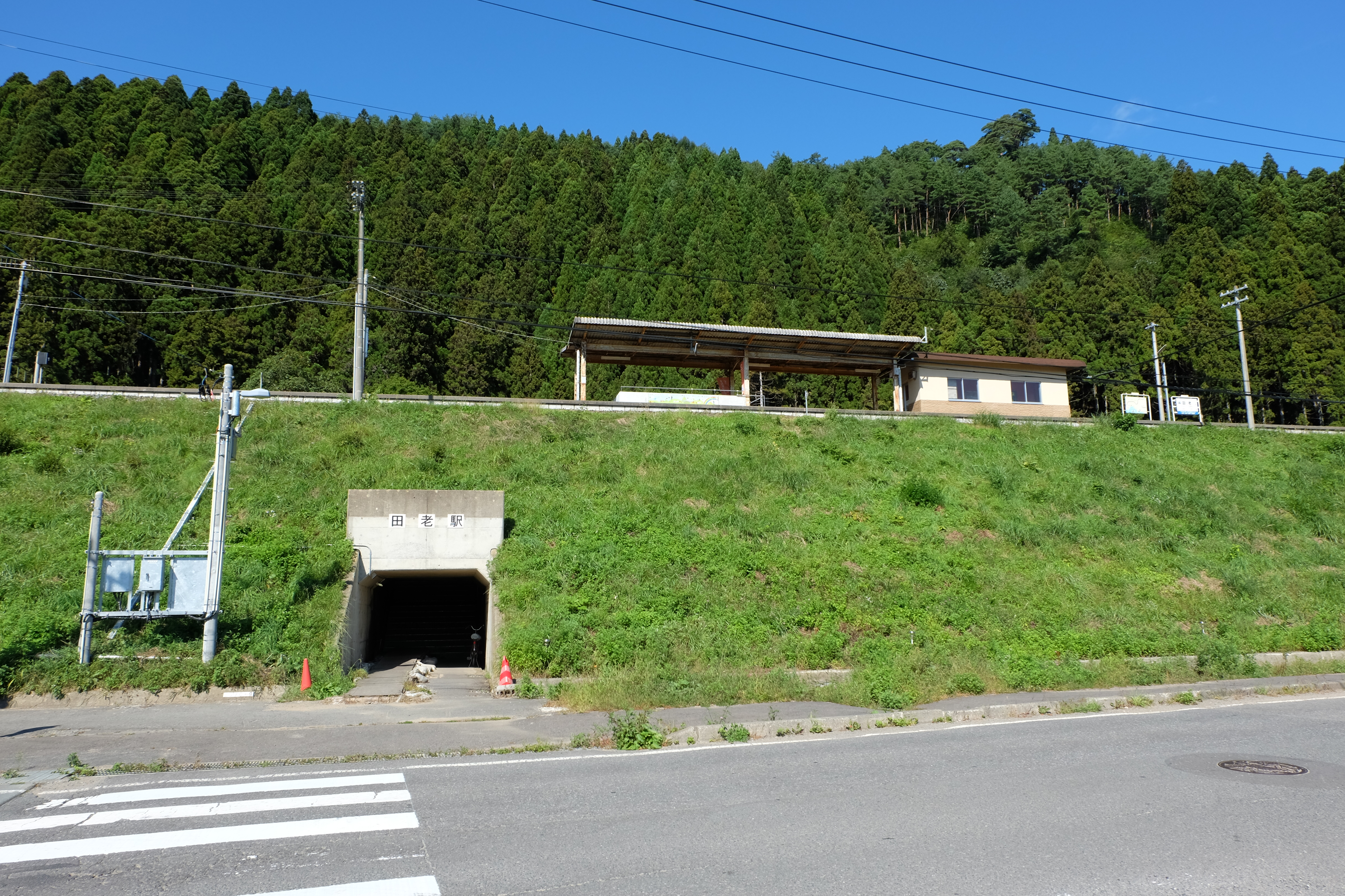 田老駅 2013年頃の様子